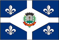 Bandeira_do_Municipio_de_Aparecida-SP